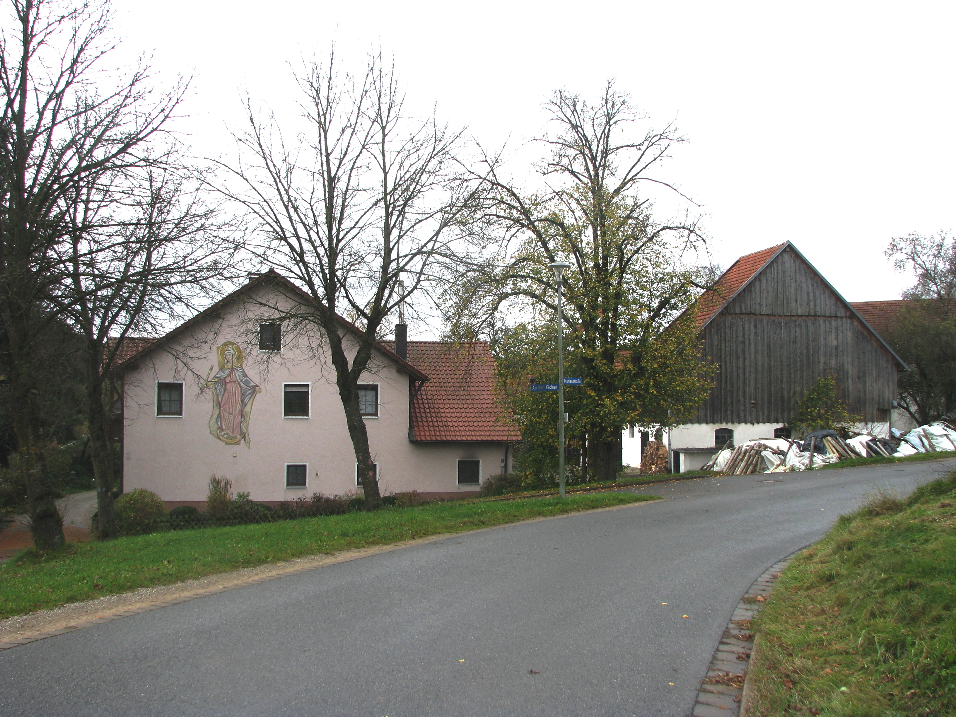 Kettenbach, Ortsteil von Berg bei Neumarkt in der Oberpfalz